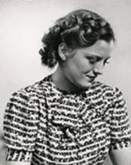 Szörényi Éva magyar színésznő.